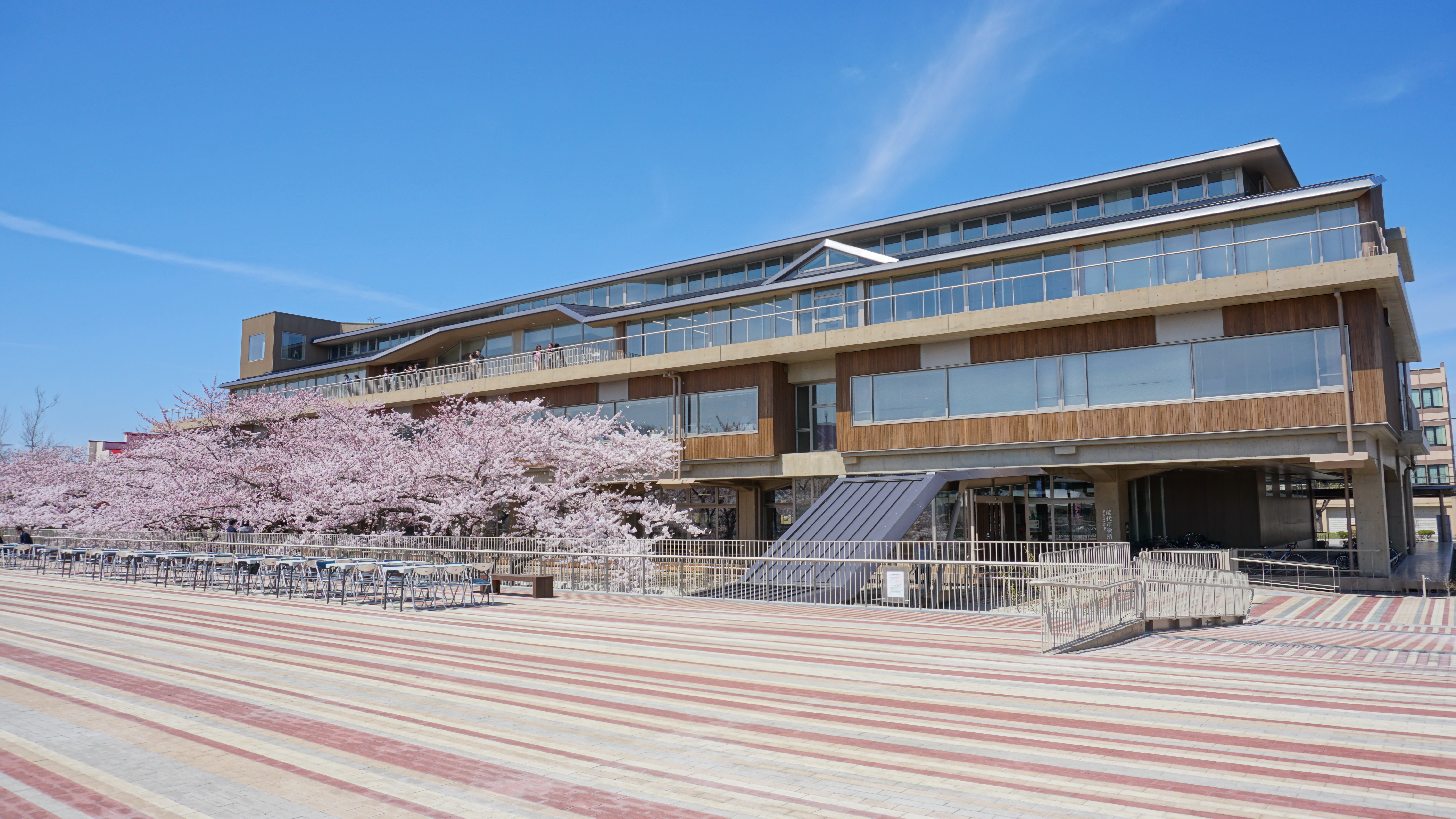 能代市役所の新庁舎とさくら庭